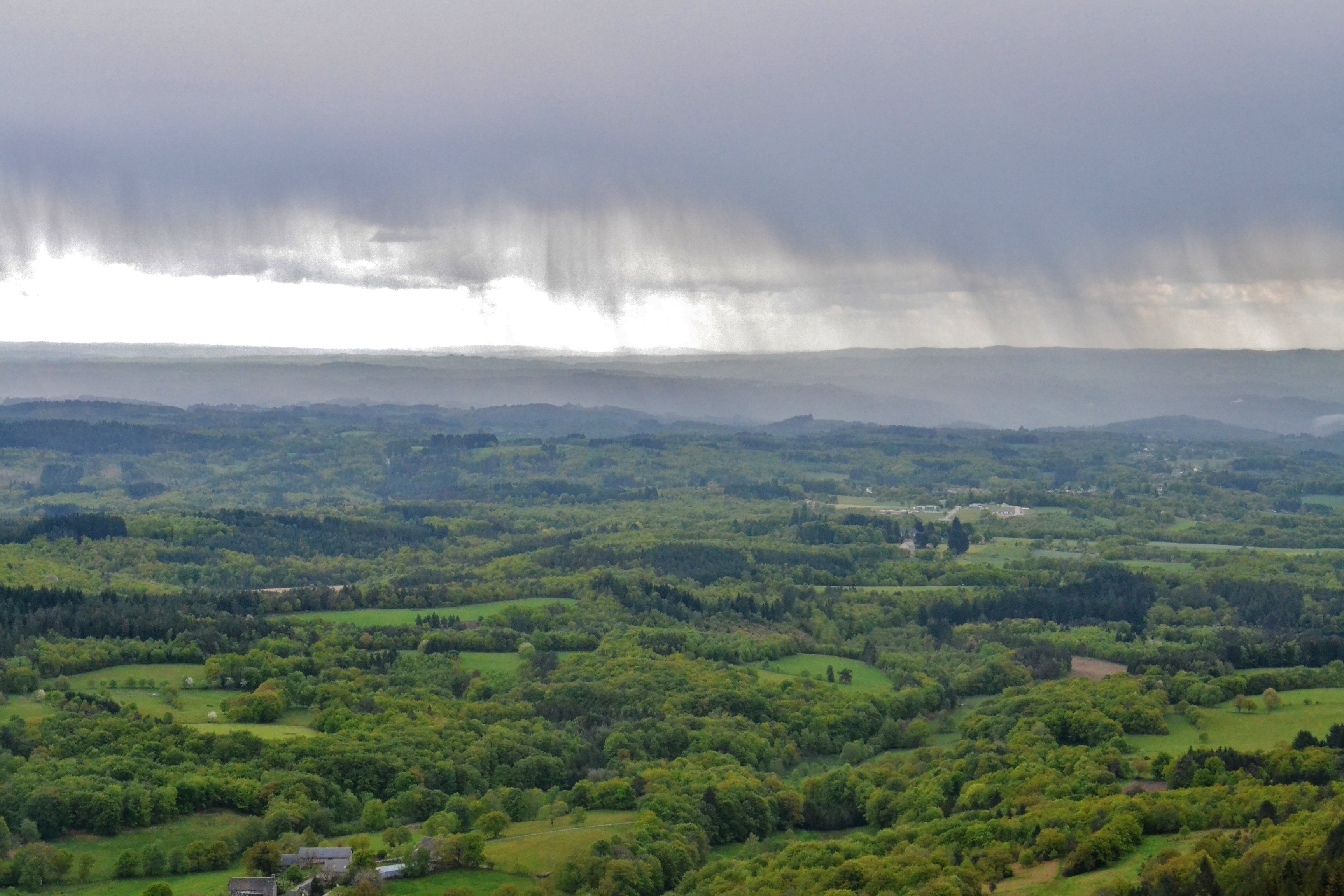 Vue depuis le Suc-au-May (908 m.), (Corrèze, France)